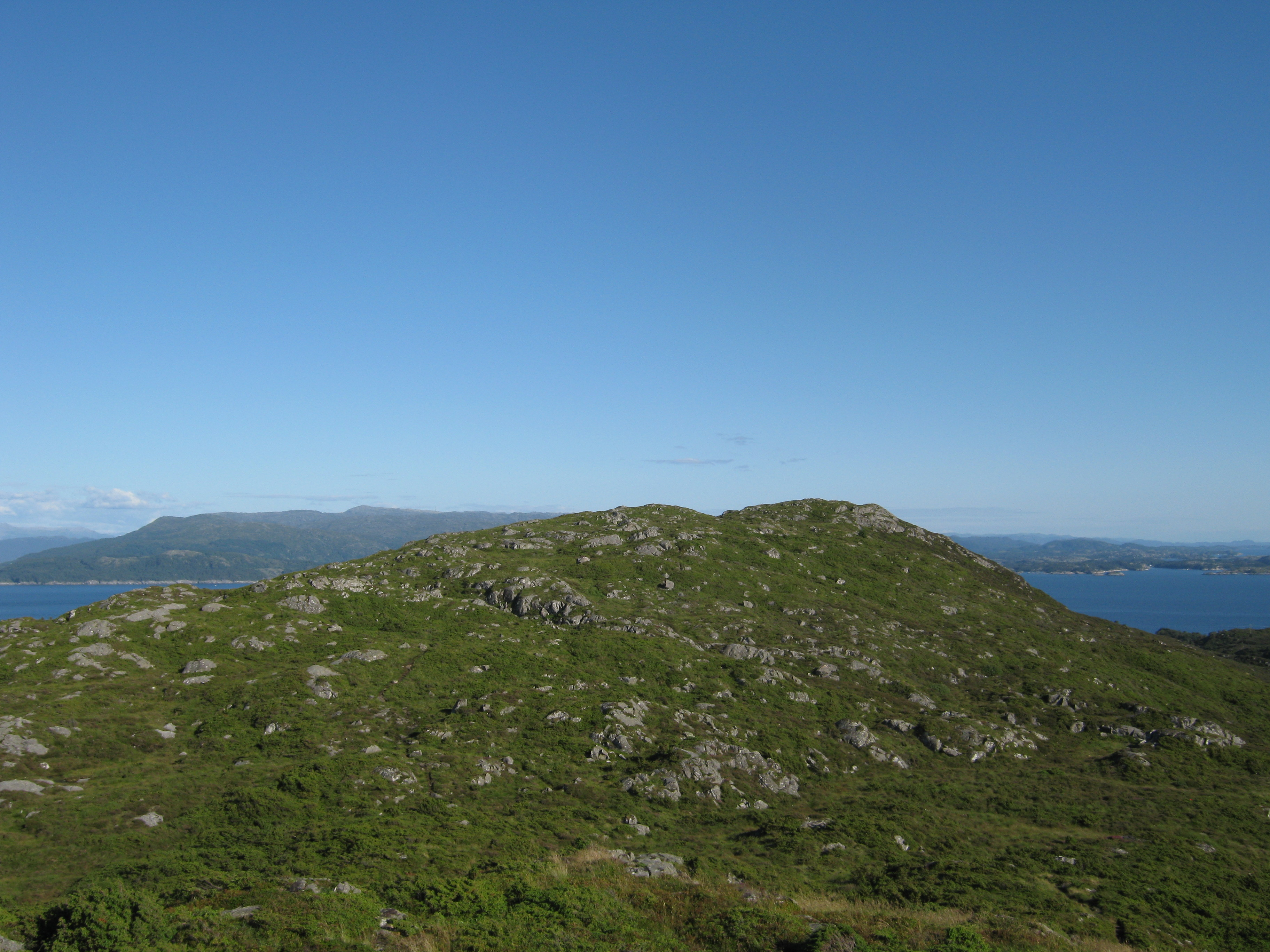 Kongsfjellet, det høyeste punkt på Selbjørn, Austevoll kommune